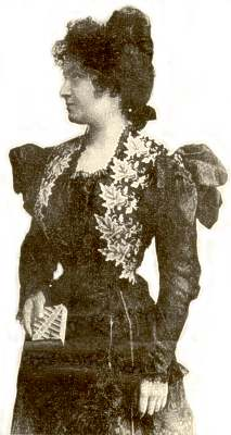 Мария Монтесори